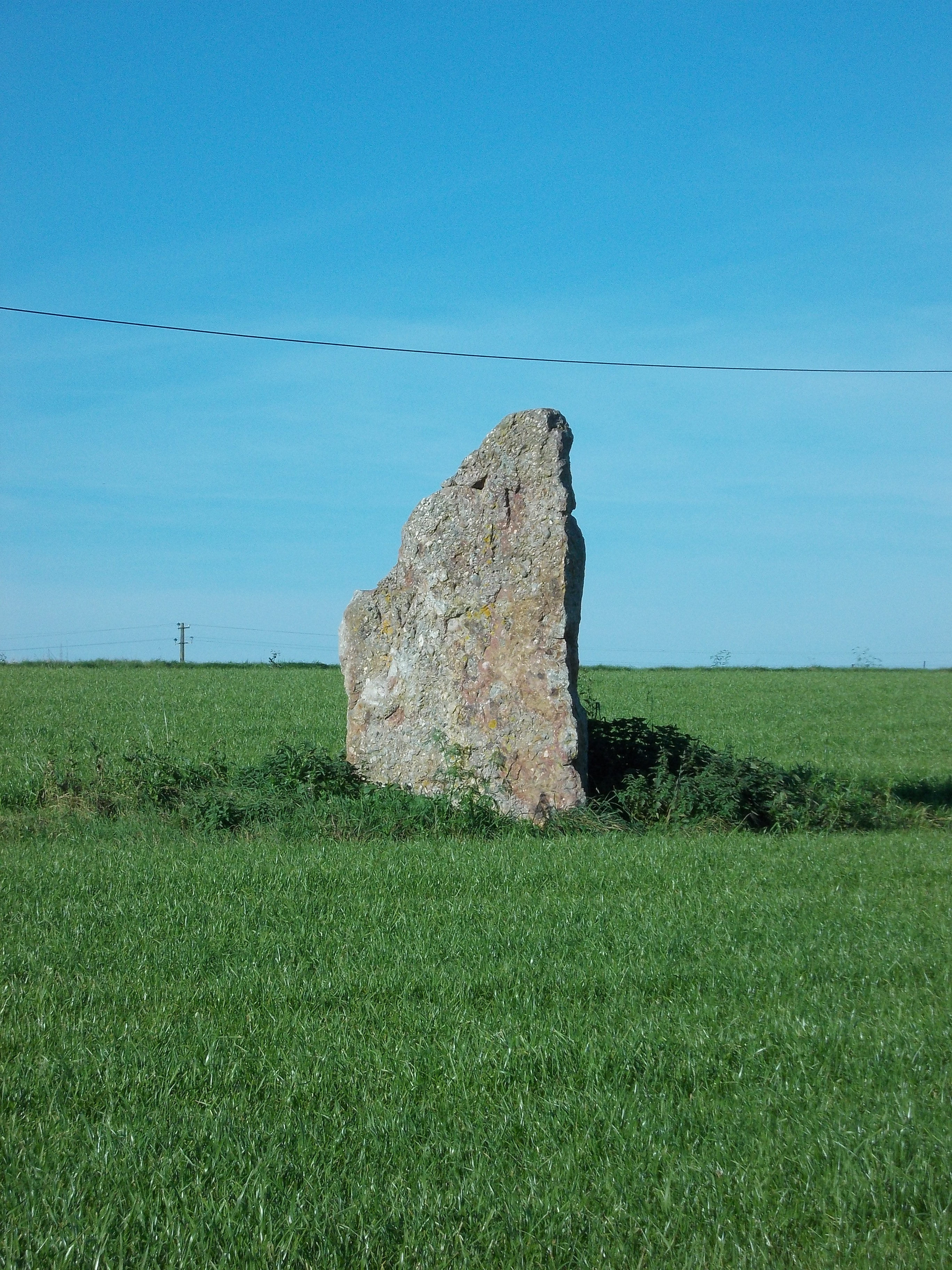 De menhir van Ozo, gezien vanuit het zuidoosten